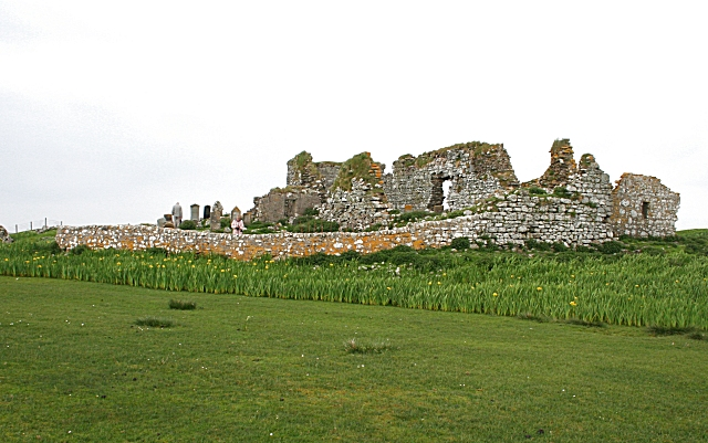 Teampall na Trionaid